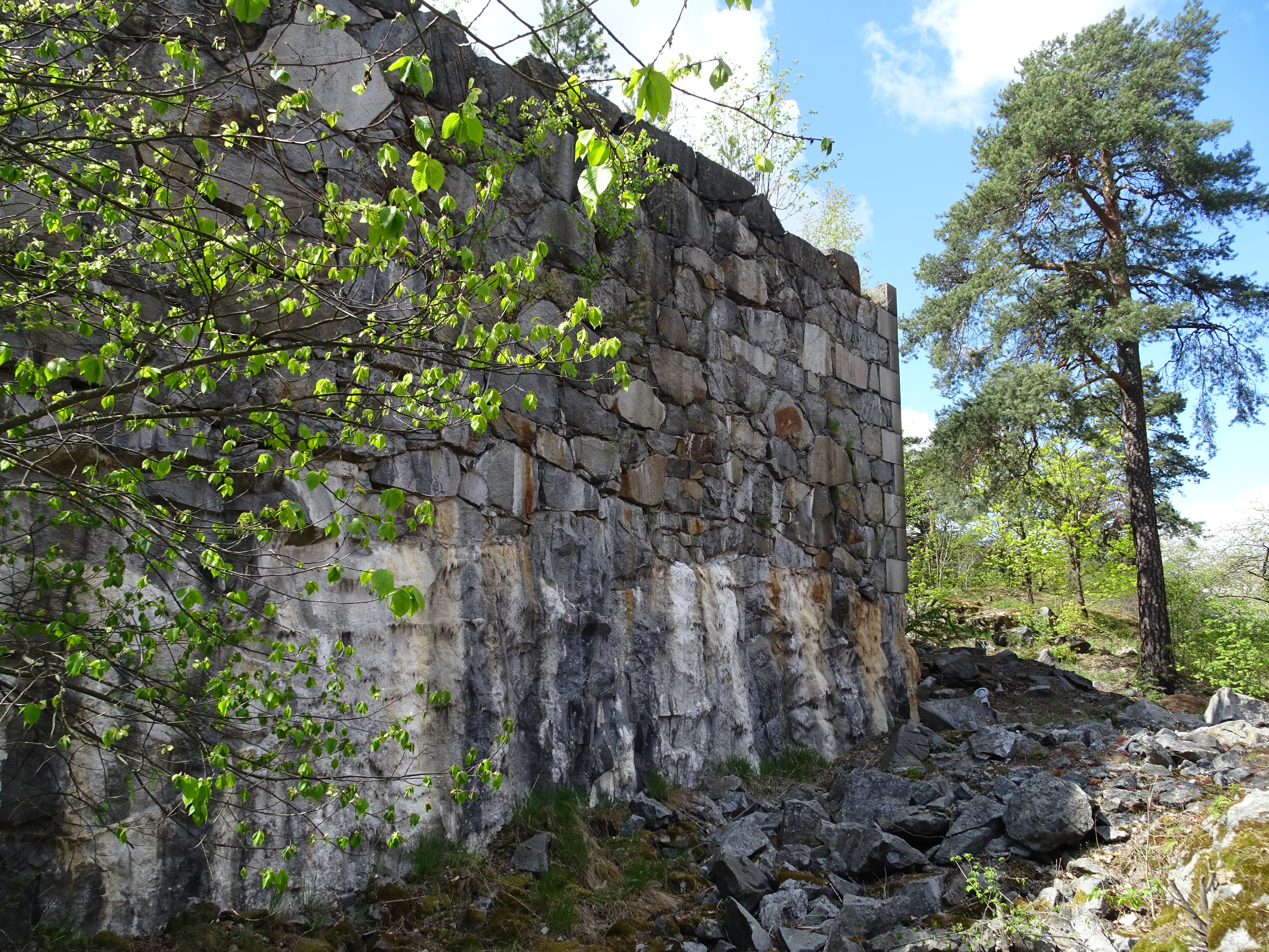 Ryska vallarna (även Ryska muren), Solna, RAÄ-nummer: Solna 57:1, en försvarsanläggning som aldrig färdigställdes.